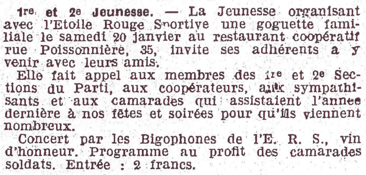 Annonce dans l'Humanité.